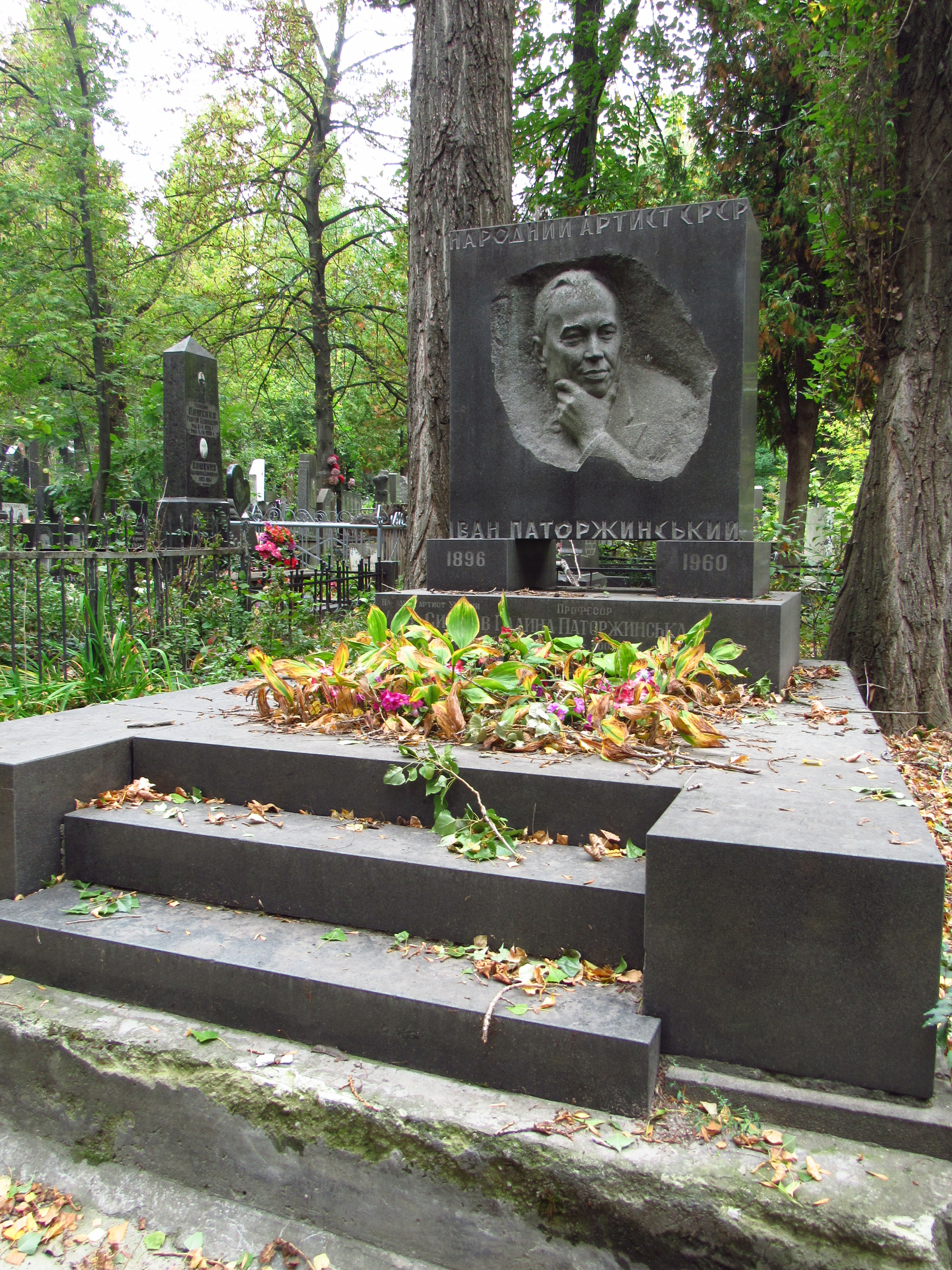 Могила співака народного артиста СРСР І. С. Паторжинського, Київ, Байкова вул., 6, діл. 8-А